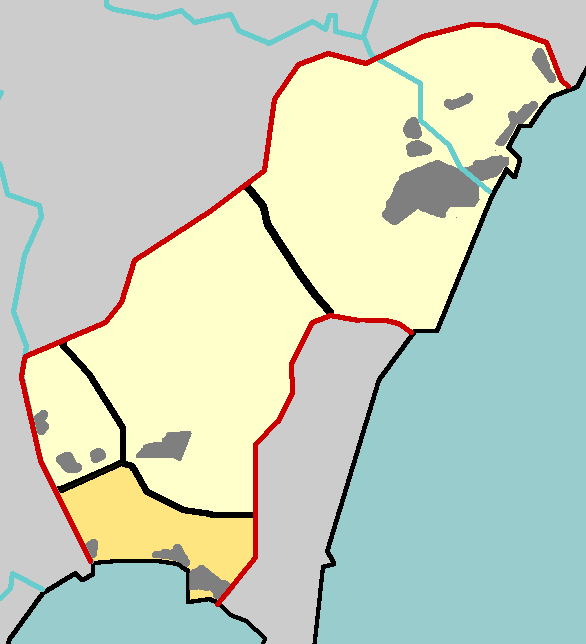 Distrito Bahía de San Roque (Cádiz)